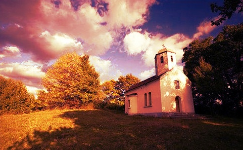 Есен в двора на Манастир Св.Никола, Райлово